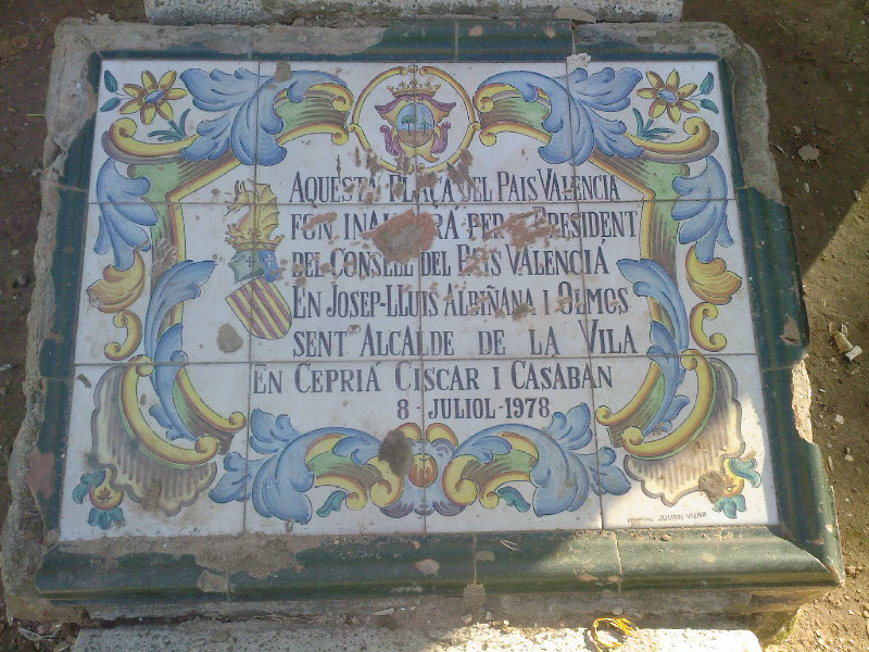 Placa_de_la_Plaça_del_PV_de_Picanya Transició Valenciana. consell preautonòmic